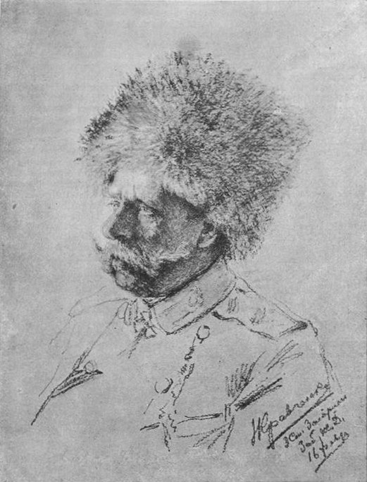 Портрет Павла Карловича Ренненкампфа работы Н. И. Кравченко.